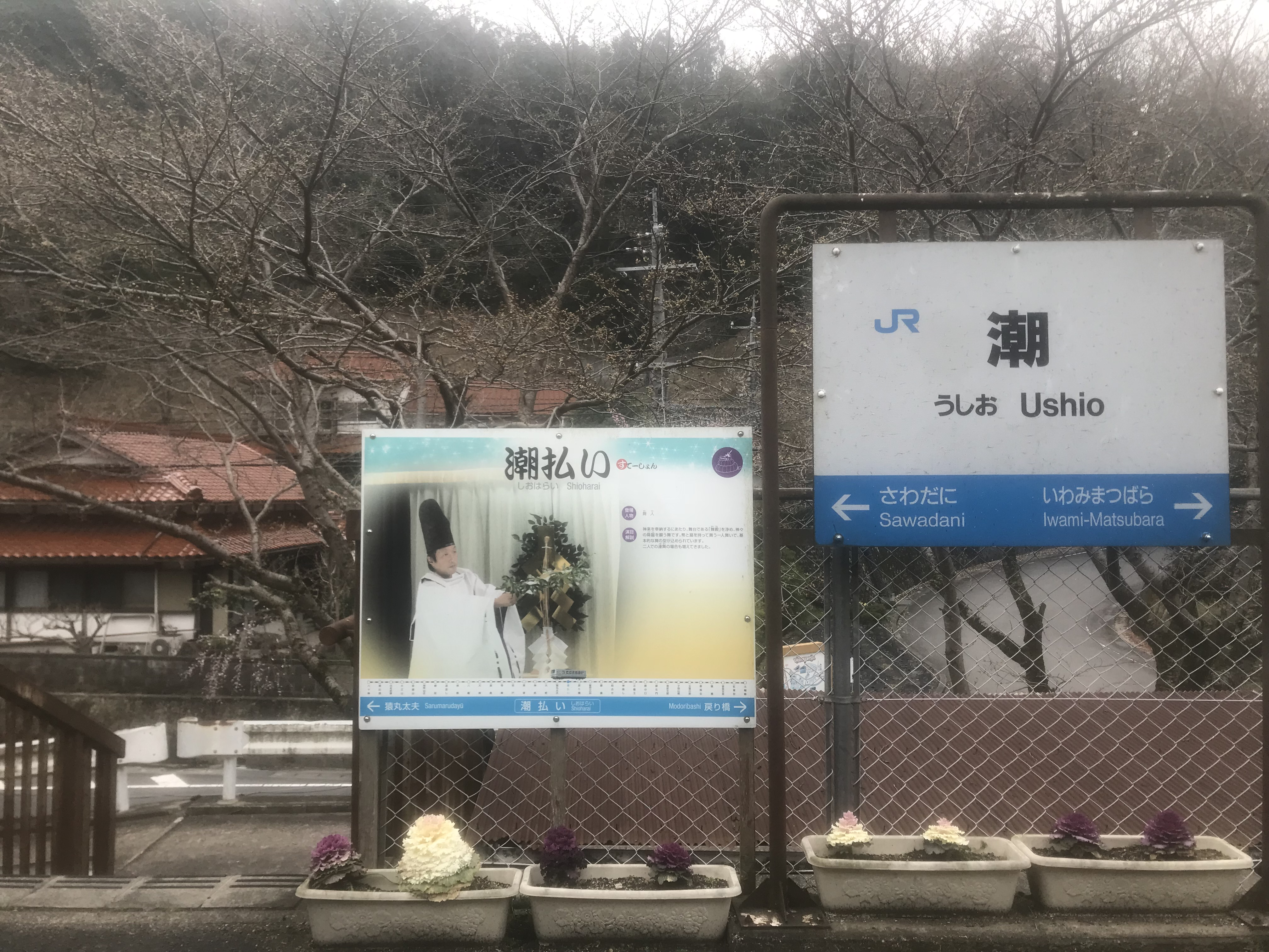 停車中の列車内より望む潮駅の駅名標。三江線バージョンのイラストは潮払い